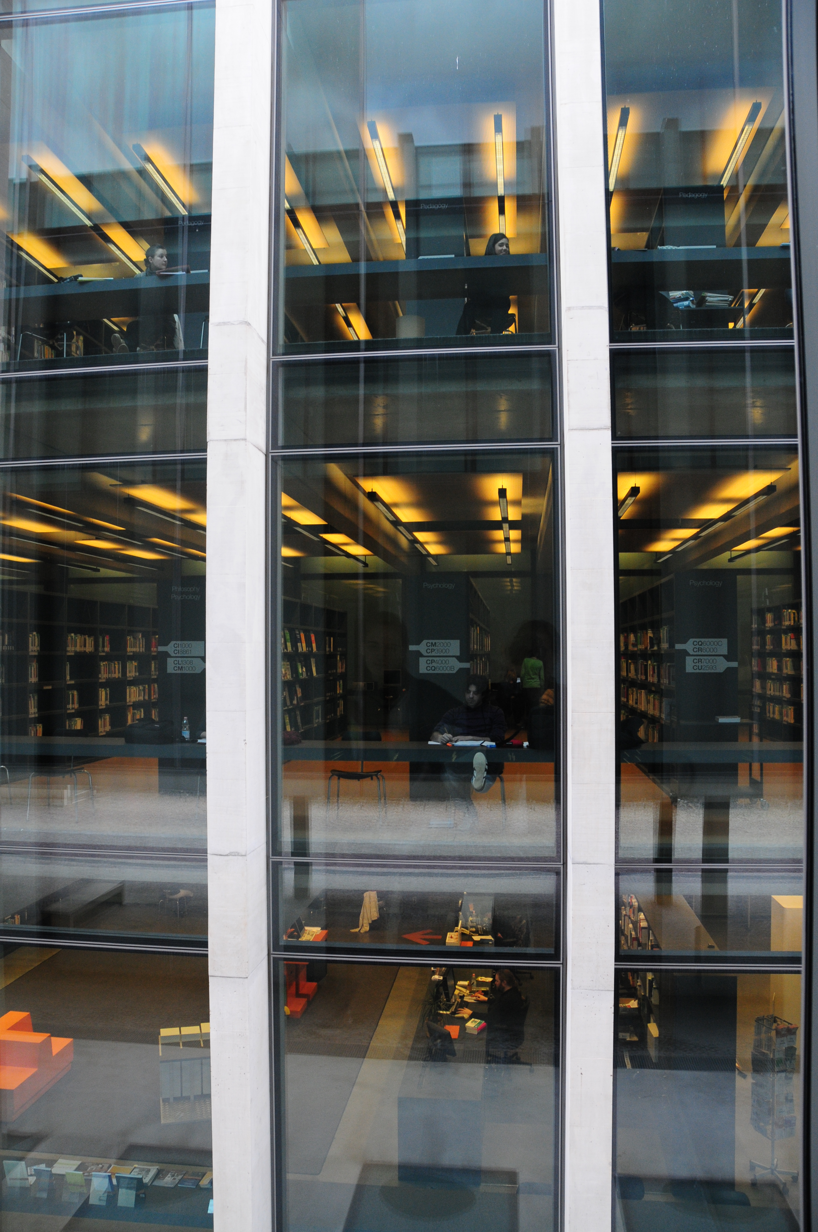 Außenansicht der Universitätsbibliothek in Brixen, mit Blick auf die Arbeitsplätze, Infotheke und Bücherregale